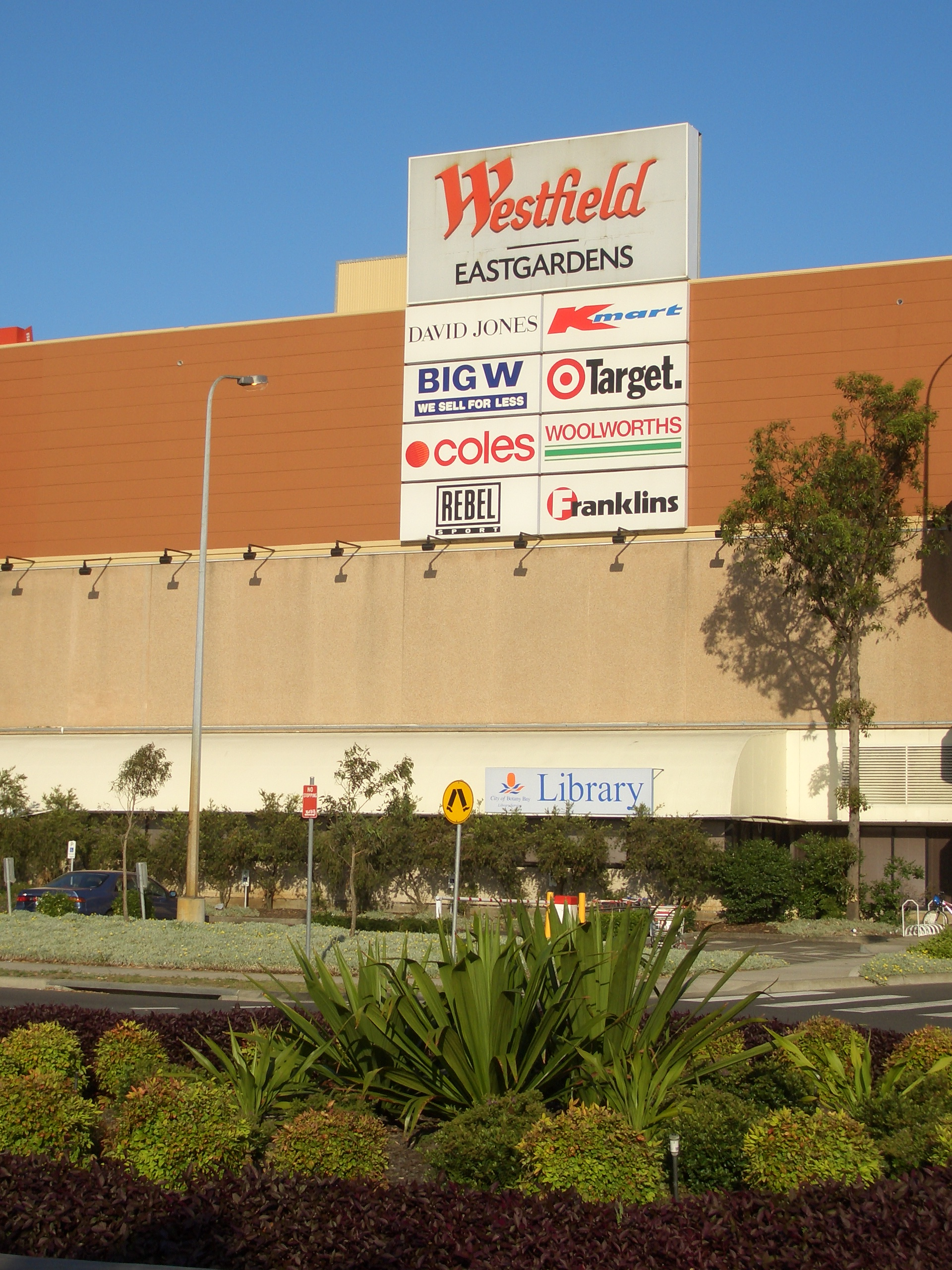 Westfield_Eastgardens